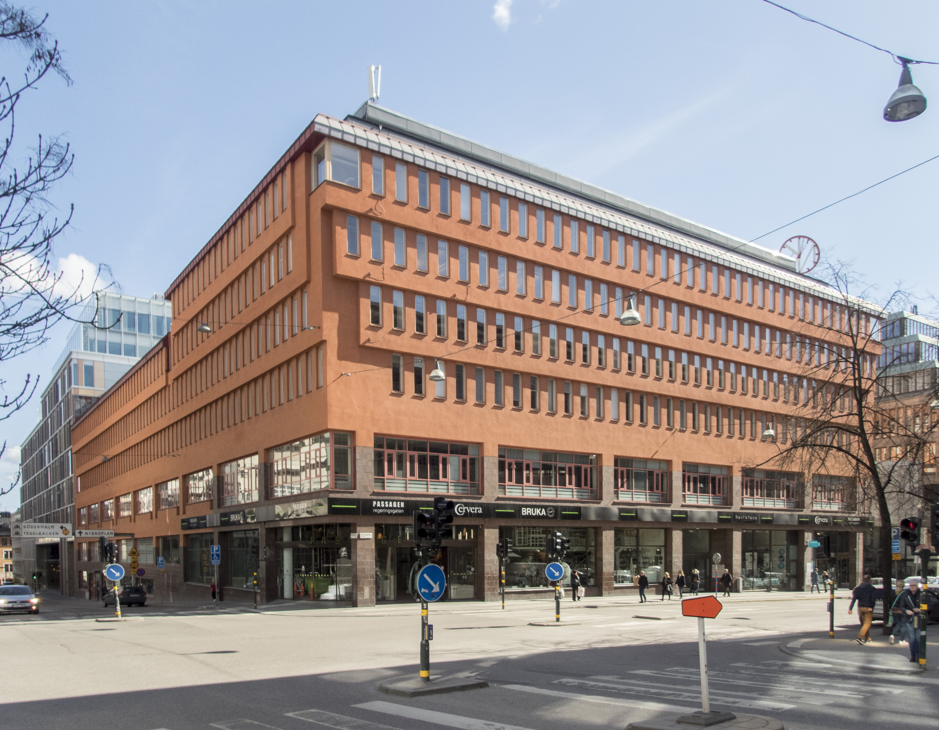 Hästen 21, Mäster Samuelsgatan 23-25, Regeringsgatan 42-44 Stockholm, Nybyggnadsår 1970 - 1973, AB Nordiska Kompaniet (Byggherre) Bengt Lindroos (Arkitekt) John Mattson Byggnads AB (Byggmästare) Sven Tyrén AB (Konstruktör)